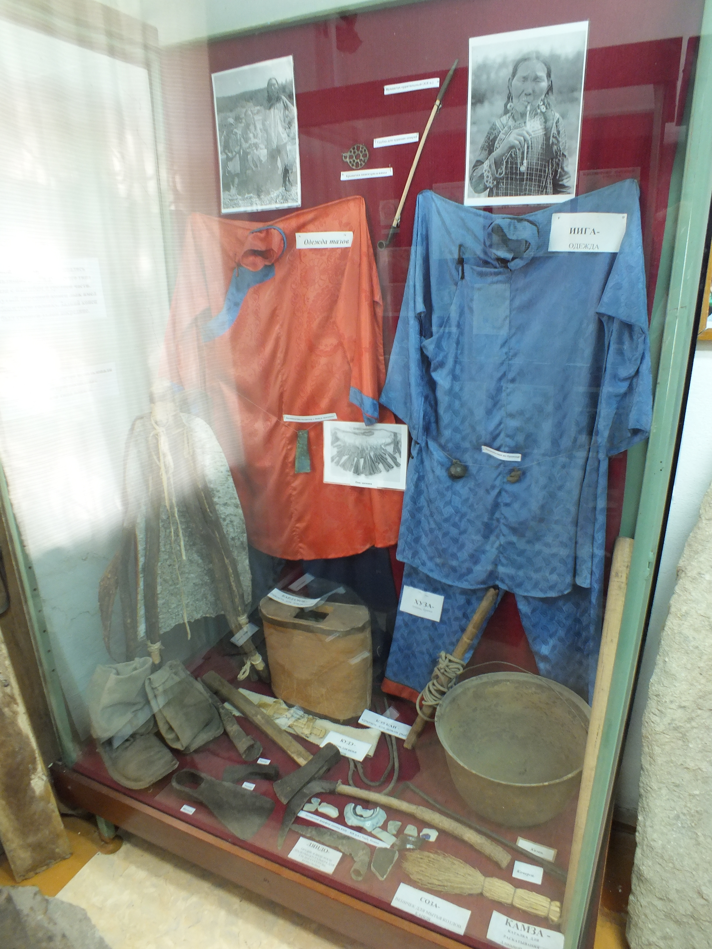 Тазы, малая коренная народность Дальнего Востока России